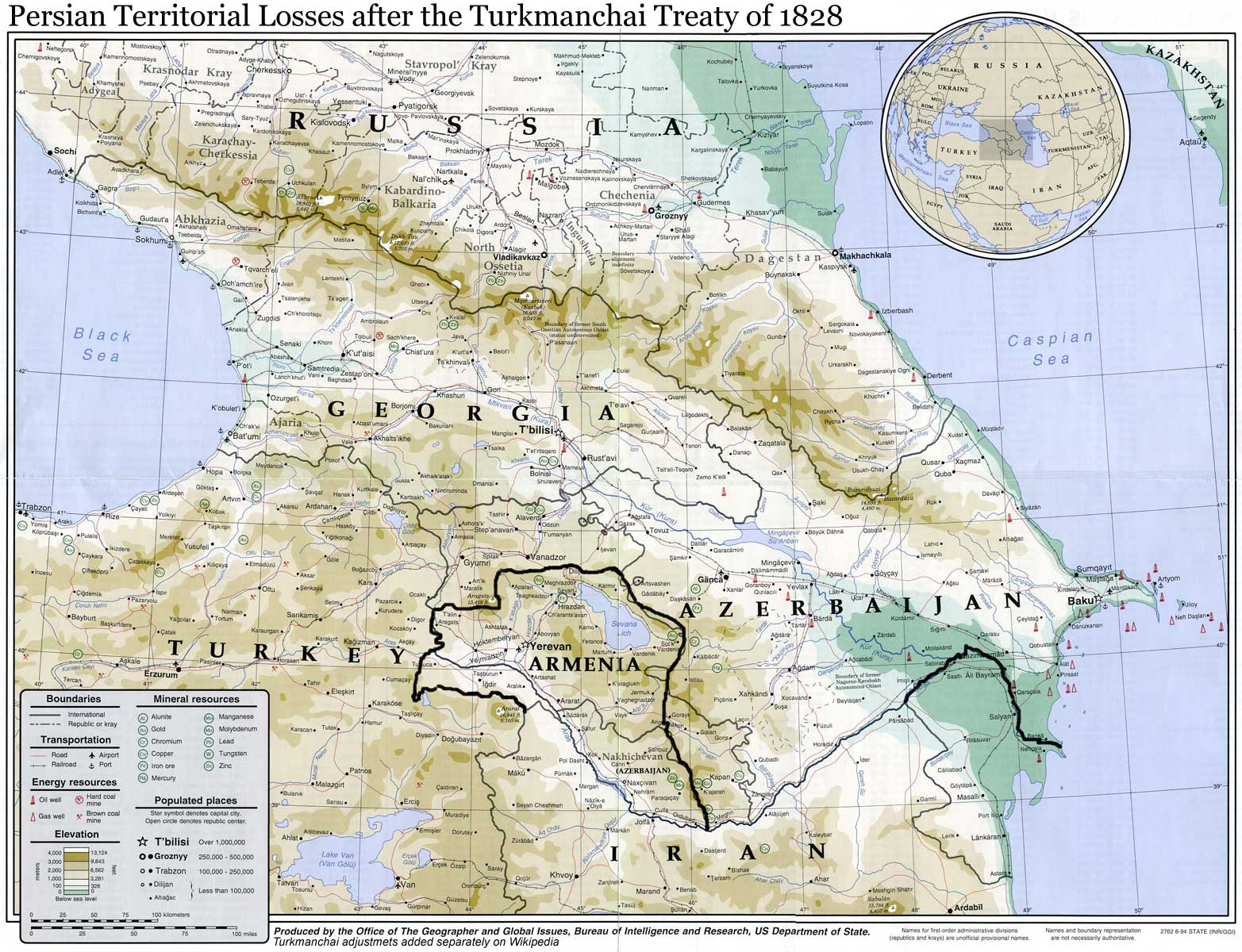 خسارات ارضی ایران در پی معاهده ترکمنچای. توسط کاوه.